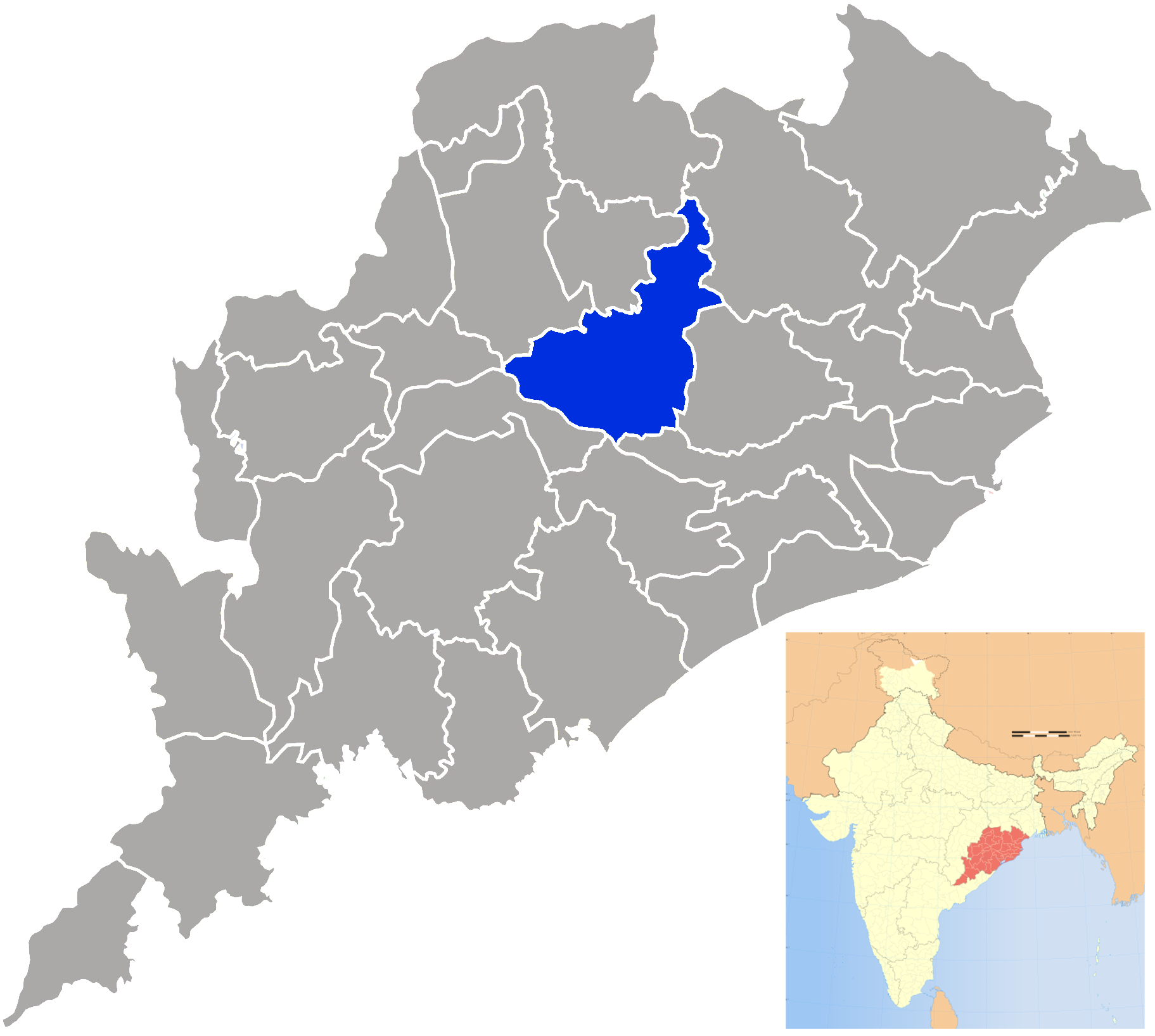 Angul district in Orissa